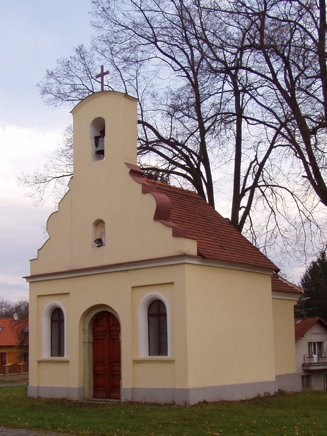 Kaple Panny Marie (Křovice)